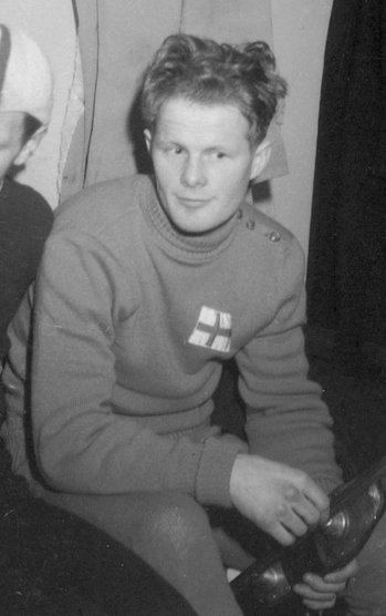 Skøyteløperne Delbert Lamb (?), Henry Wahl og Kauko Salomaa